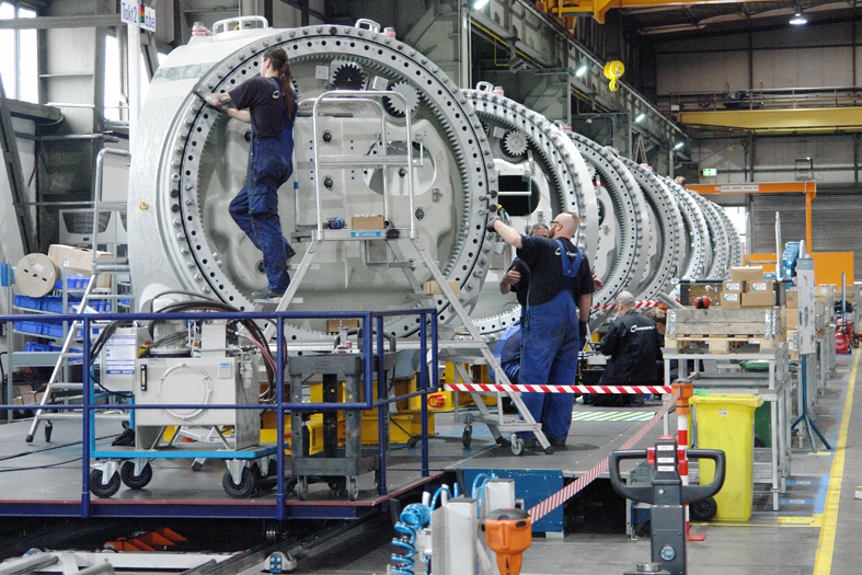 Montagearbeiten beim Windkraftanlagenhersteller Nordex Energy GmbH Rostock